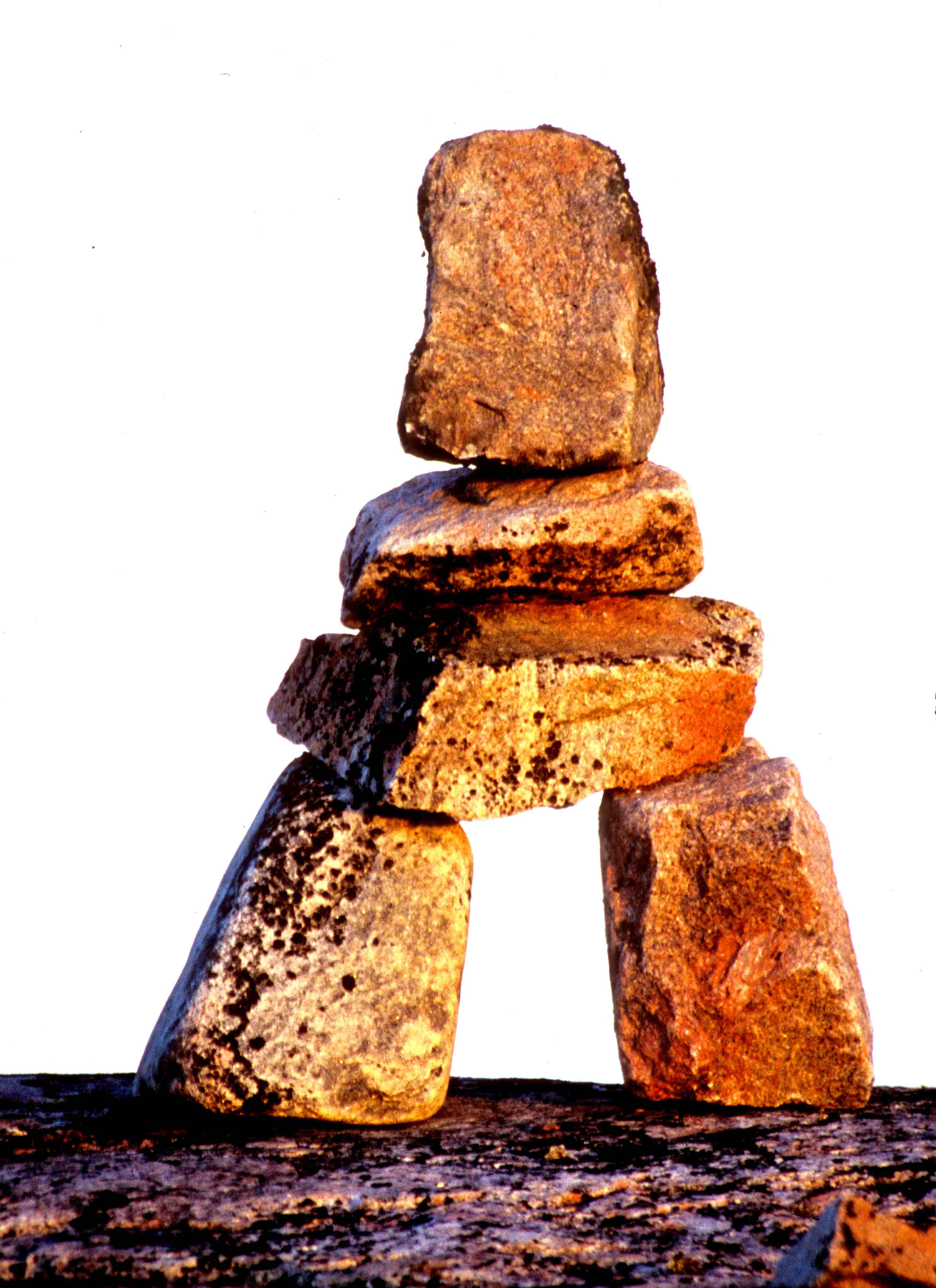 Inunnguaq, „human shape“ (Inuksuk)